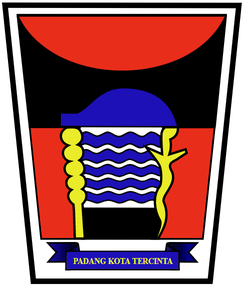 Lambang Padang alternatif